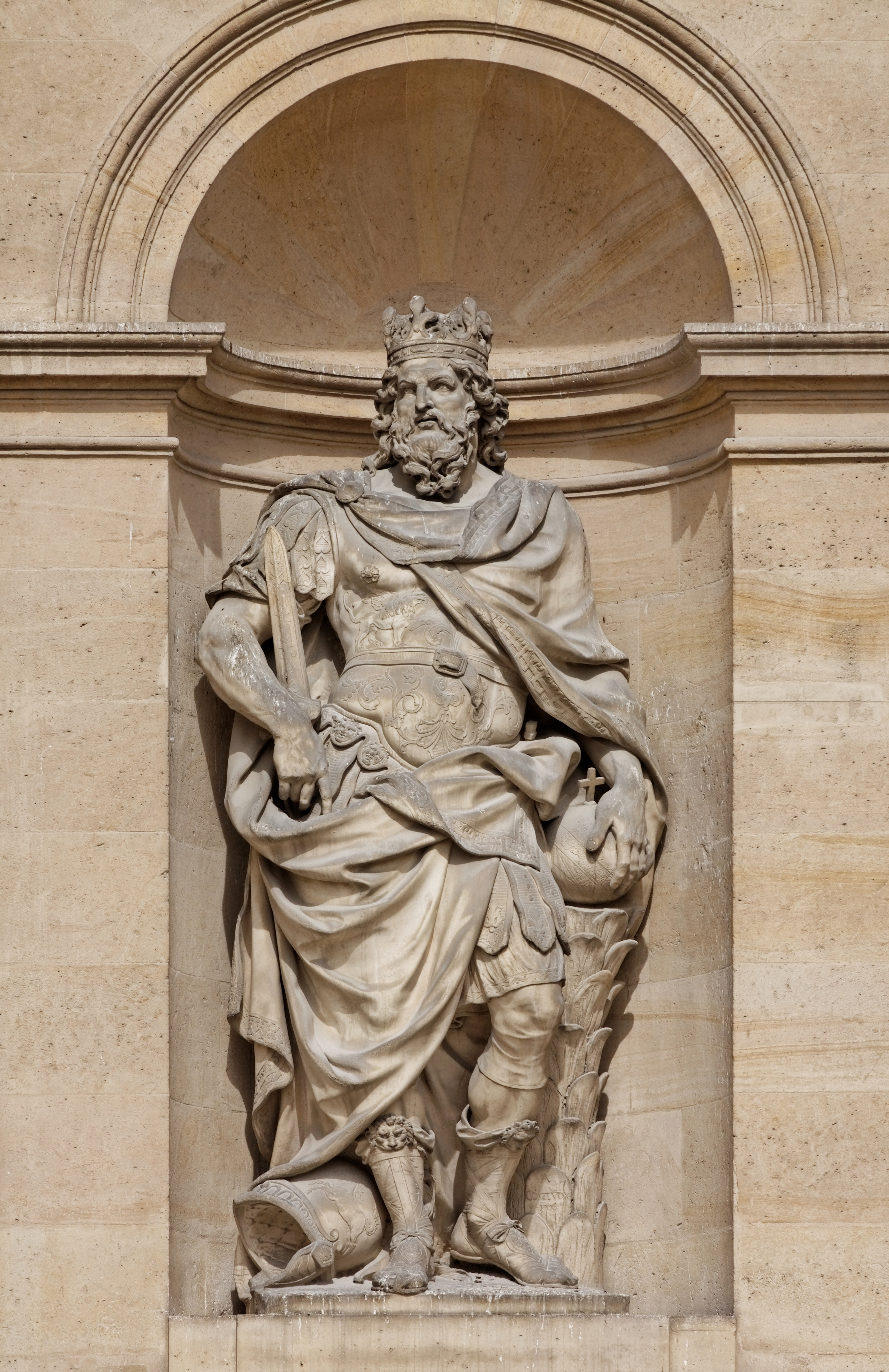 Antoine Coysevox (Français, 1640-1720): statue colossale en pied de Charlemagne, 1706, marbre, façade principale du Dôme des Invalides, Paris, France.